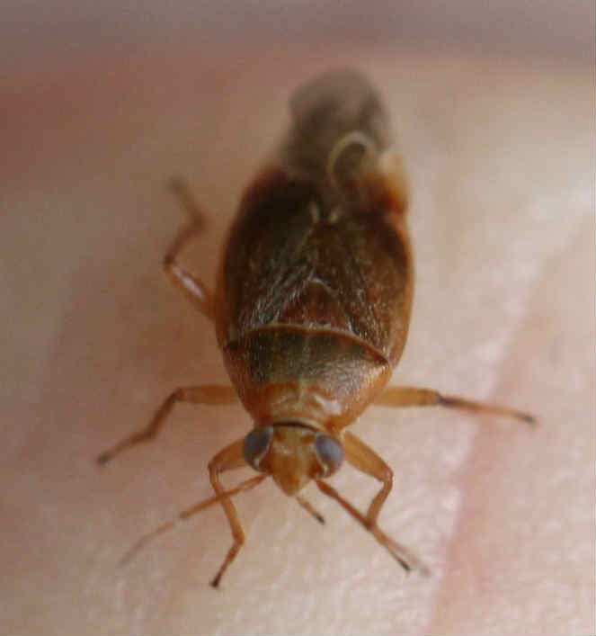 Agnocoris reclairei am 20.6.2017 am Rheinufer südlich von Mannheim